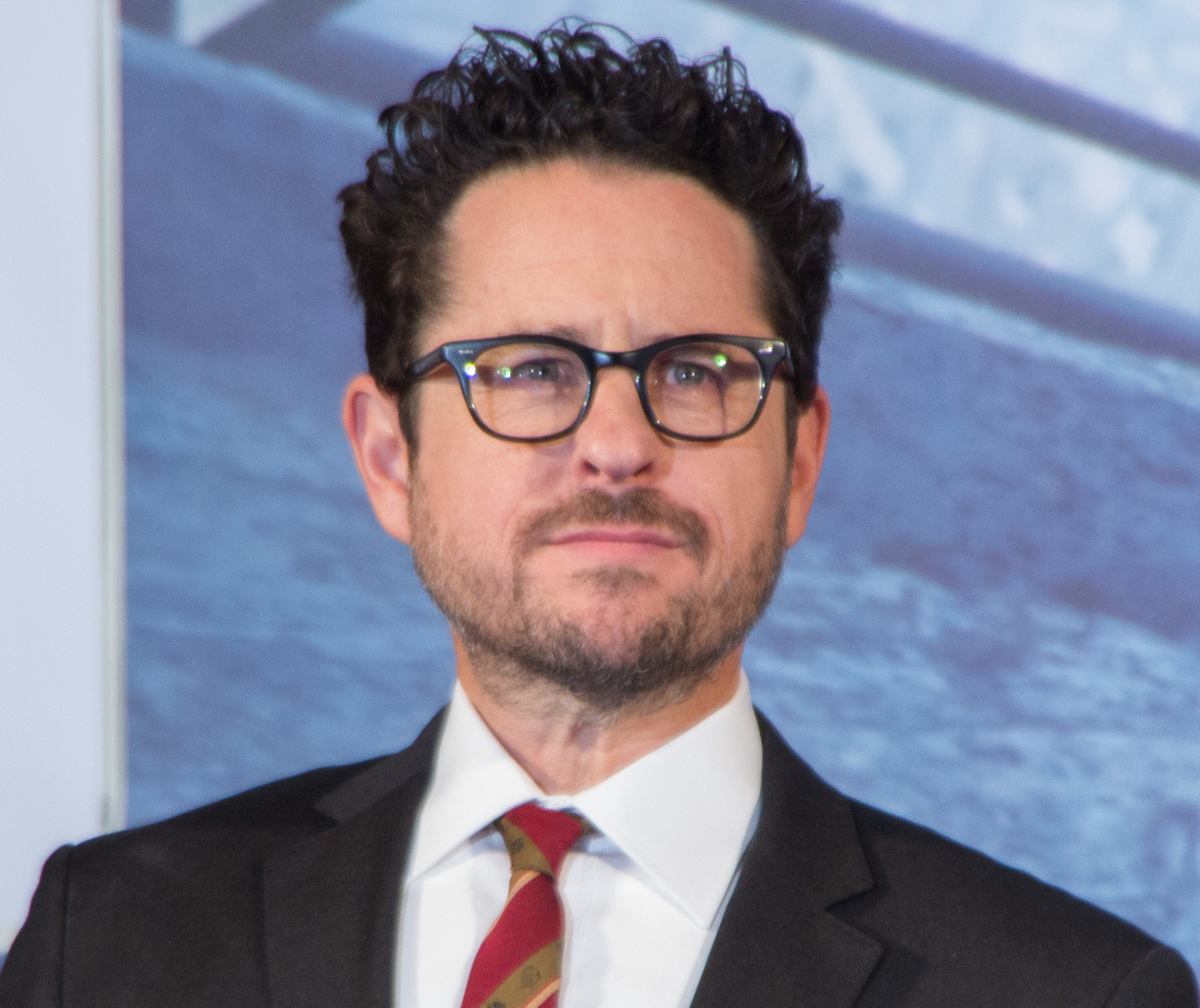 スター・トレック BEYOND ジャパン・プレミア レッドカーペット J・J・エイブラムス